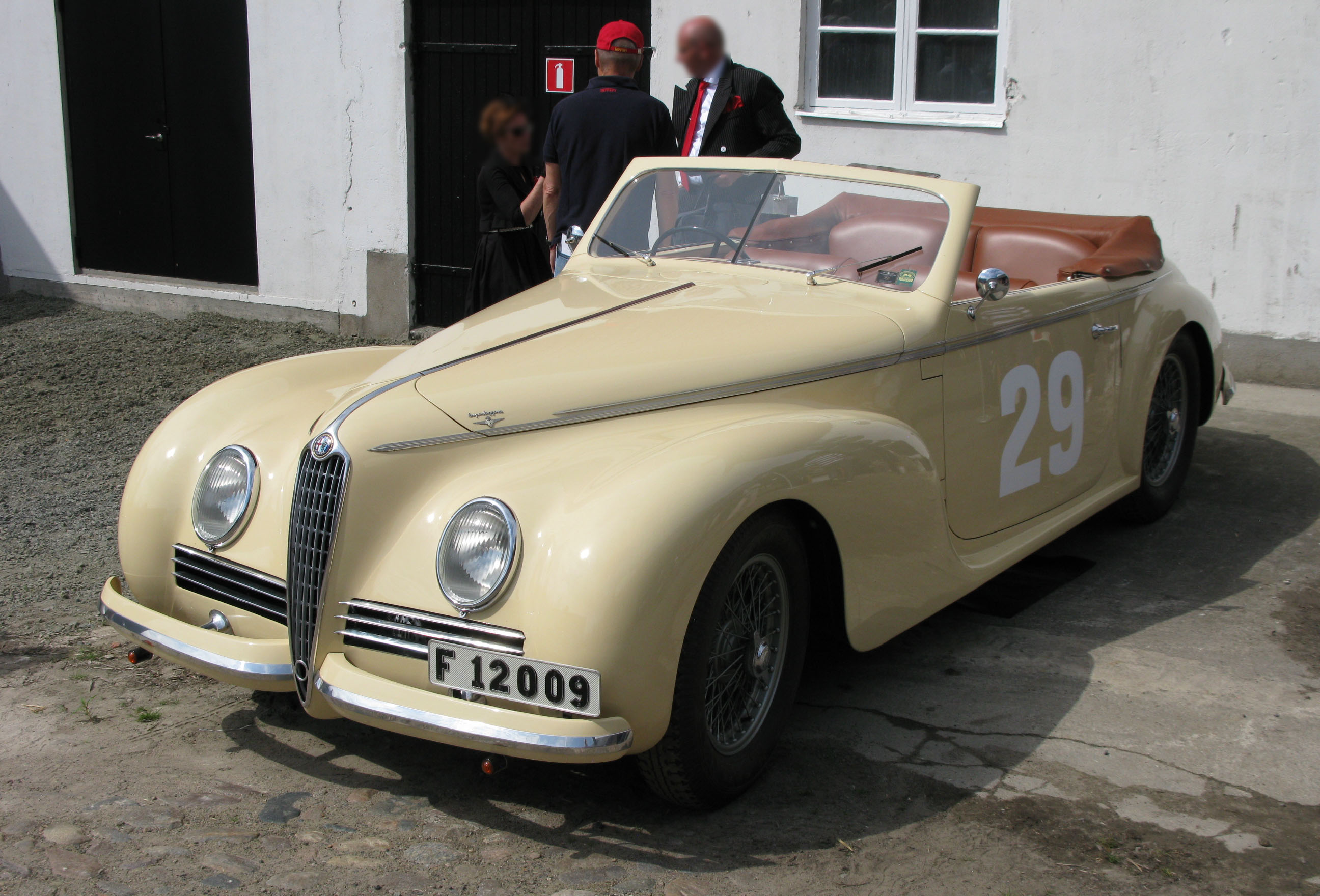 Alfa Romeo 6C2500 cabriolet